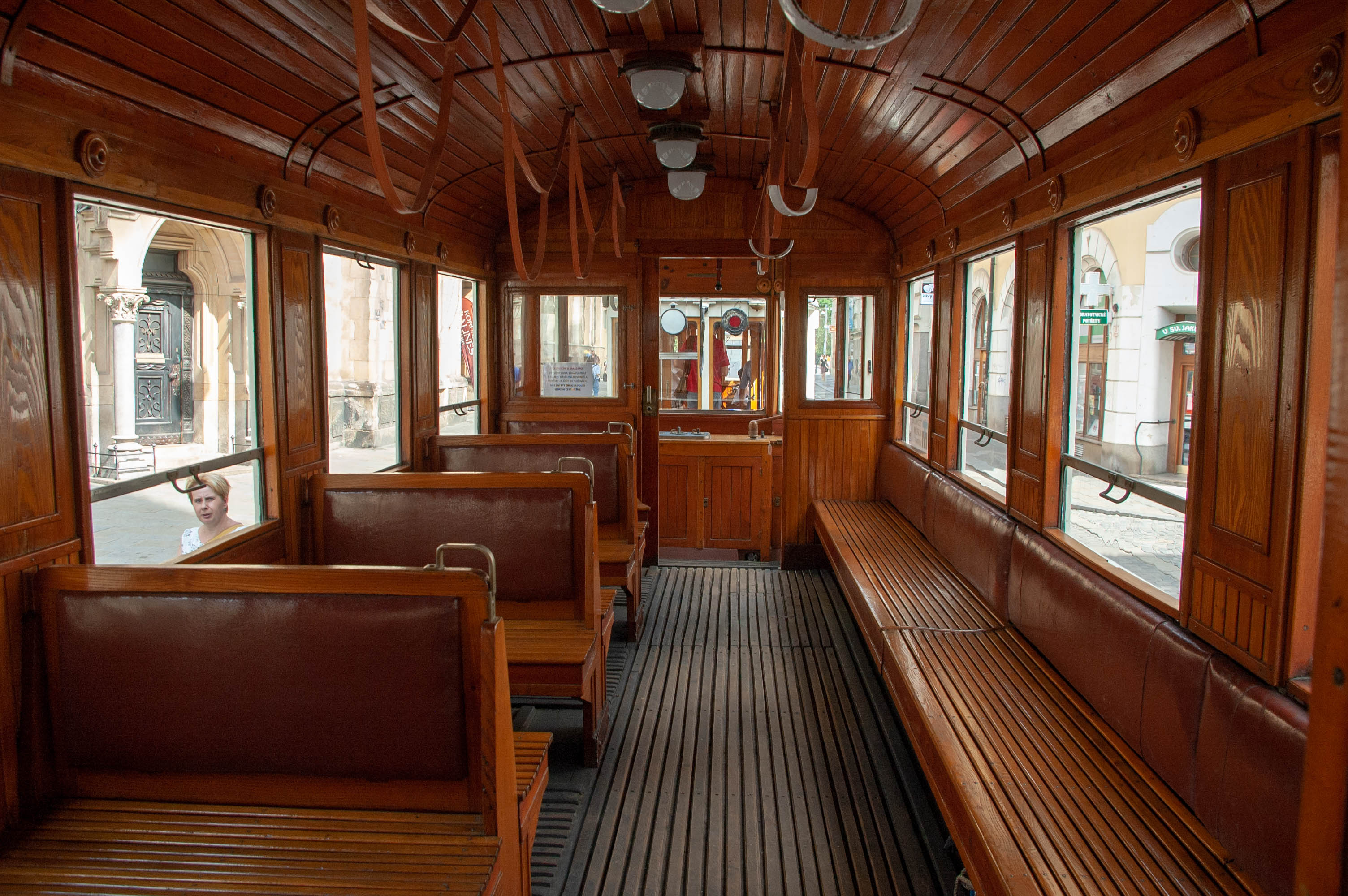 Dopravní nostalgie 2019 – tramvaj ev. č. 57